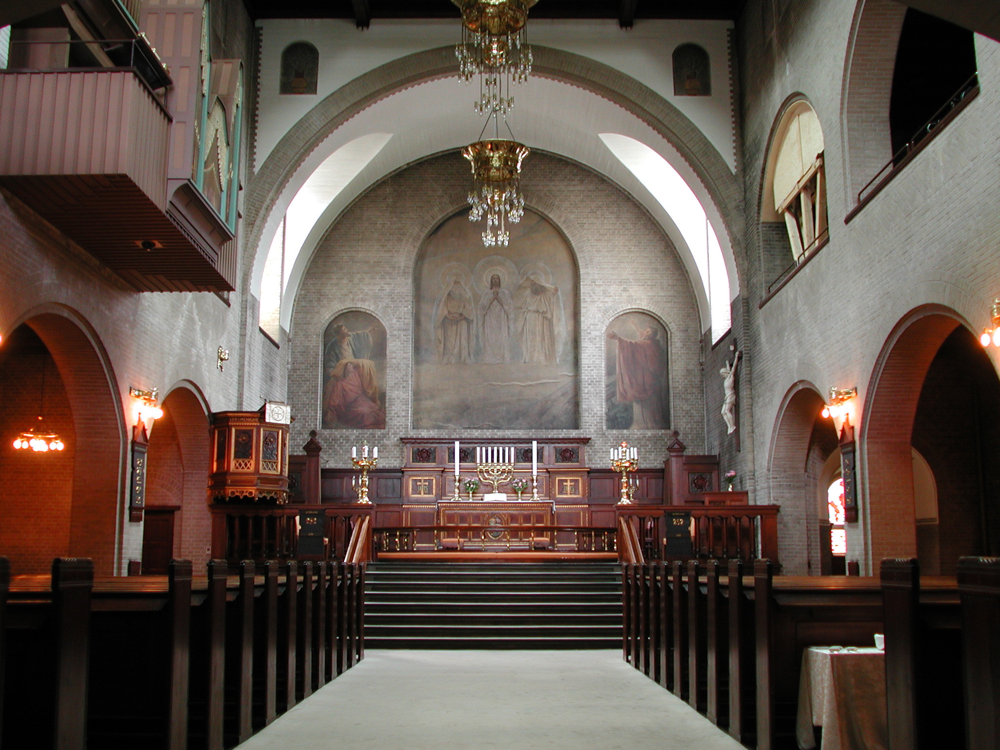 Elias Kirken in Copenhagen, Denmark. Interior view.